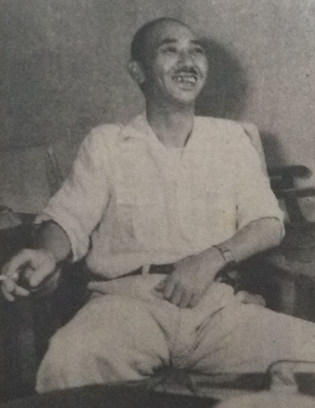 永井八津次